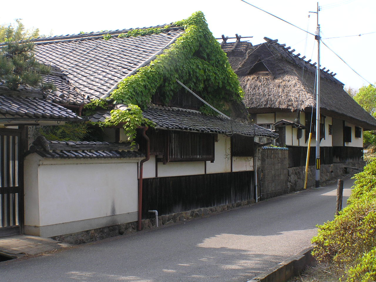 古民家（篠山市）